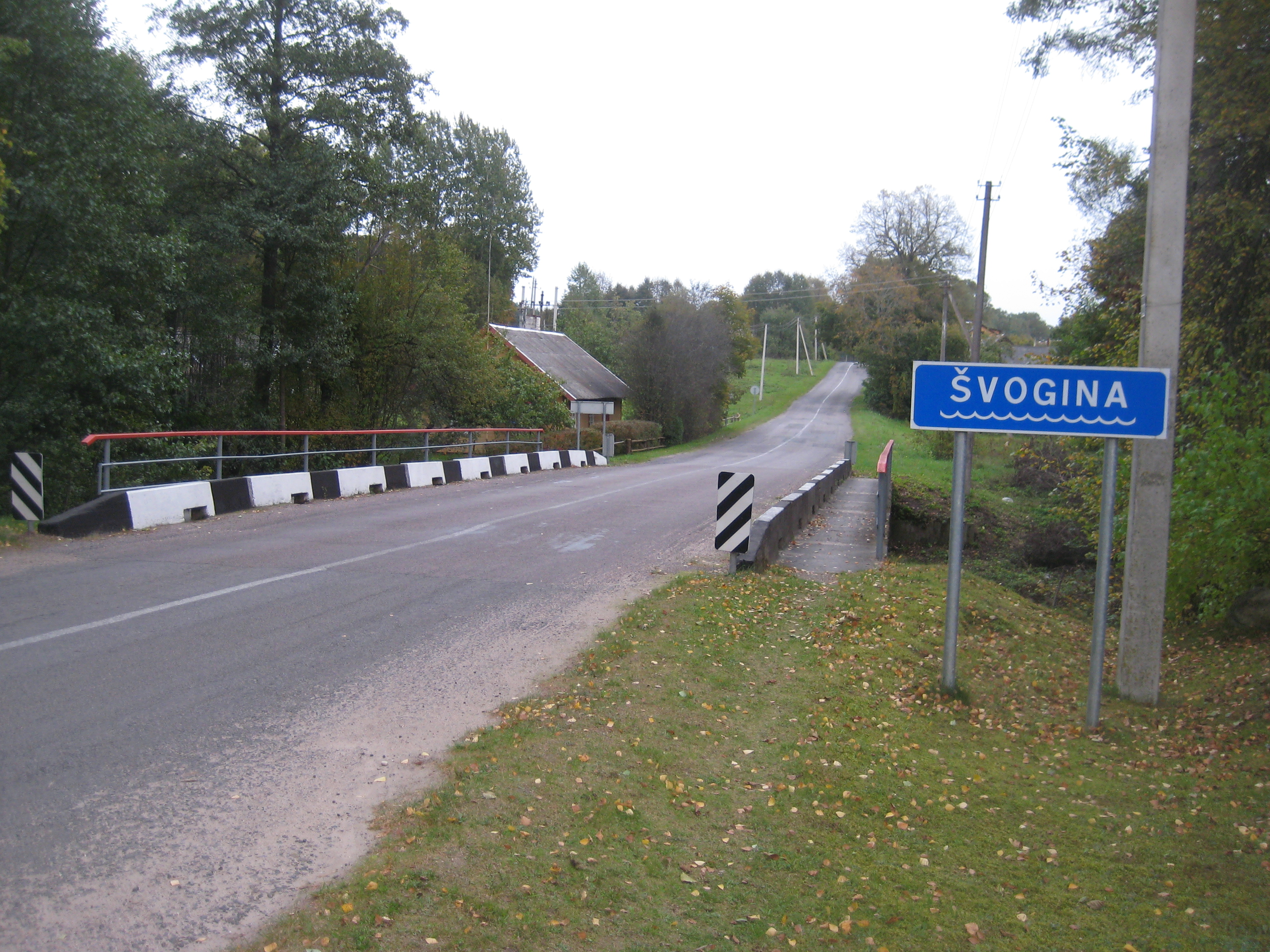 Vaišniūnai 30142, Lithuania